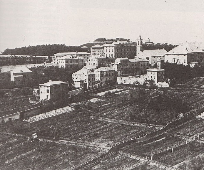 Un'immagine di inizio Novecento dell'allora borgo di San Martino d'Albaro, Genova, Liguria, Italia